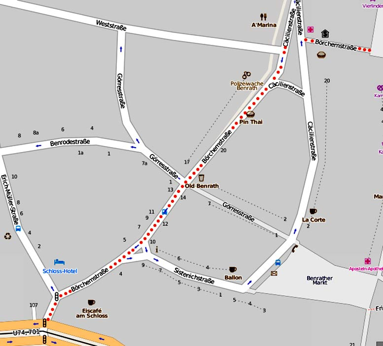 Karte Börchemstraße Benrath, Düsseldorf